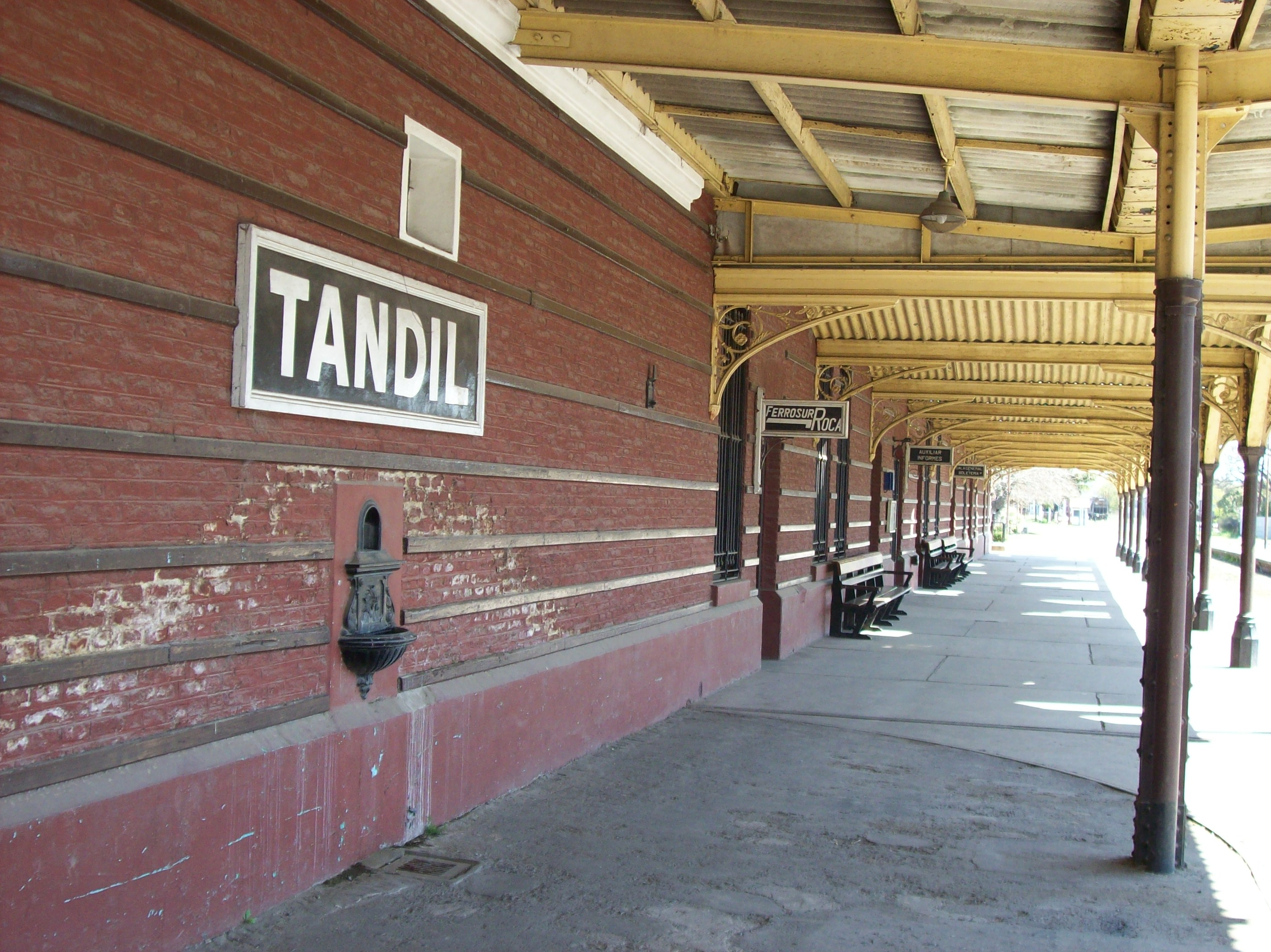 Andén de la estación Tandil hacia el sudoeste, en la Provincia de Buenos Aires, Argentina.